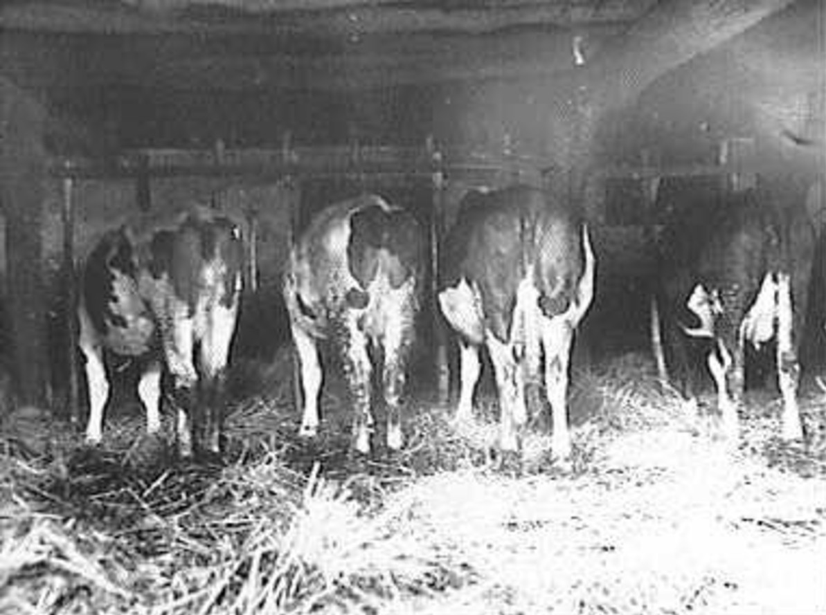 Zuidelijke en oostelijke zandgronden/ Rundveestalinterieur: potstal (opmerking: Deze afbeelding hebben wij helaas alleen in deze lage resolutie.)